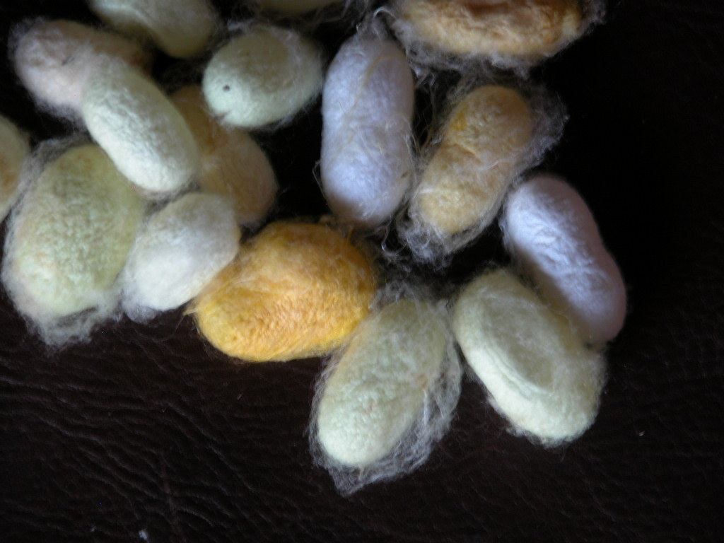 foto mia personale,bozzoli di baco da seta, 2007 Licensing Categoria:Immagini sulla tessitura